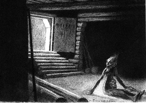 Овинник. Рисунок Ивана Билибина, 1934 год